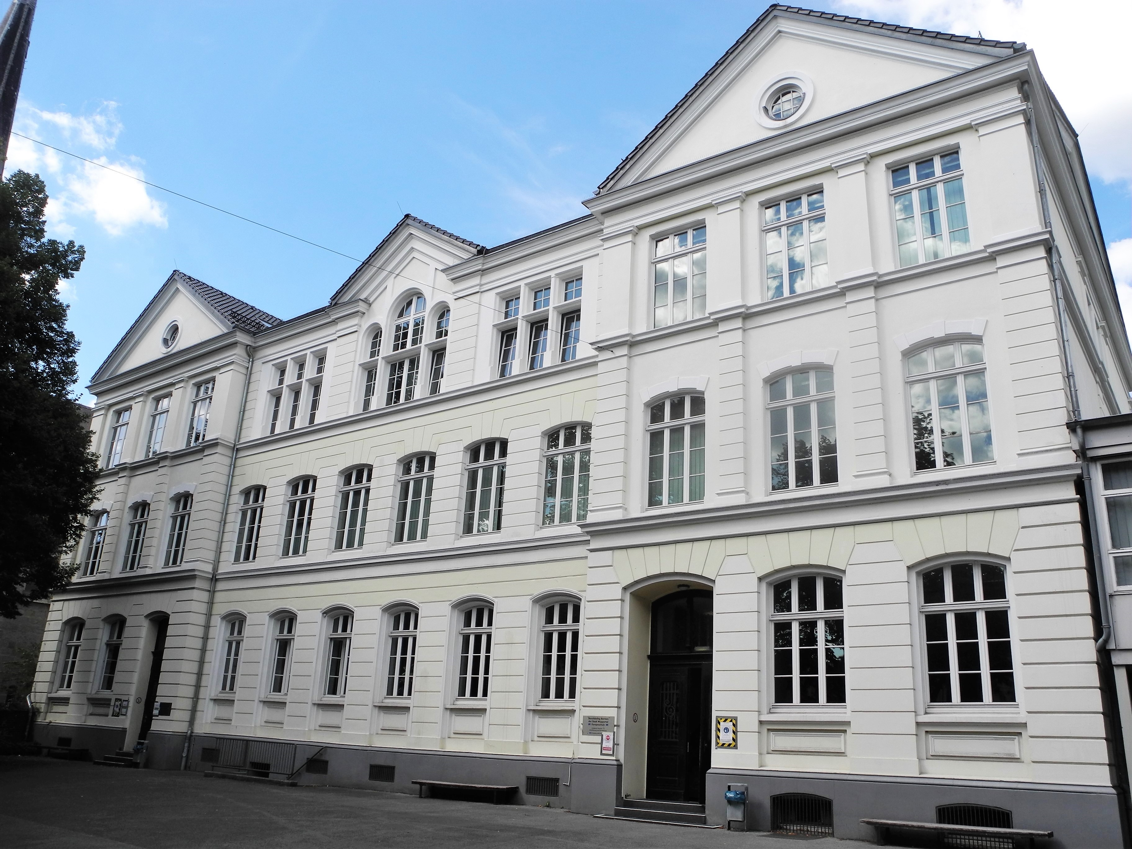 Wuppertal, Wohnquartier Oberbarmen-Schwarzbach, Berufskolleg Barmen, Hauptgebäude Sternstr. 75